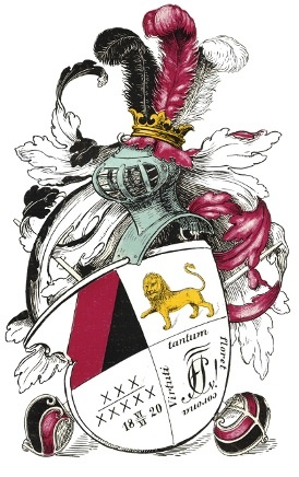 Studentenwappen des Corps Thuringia Jena